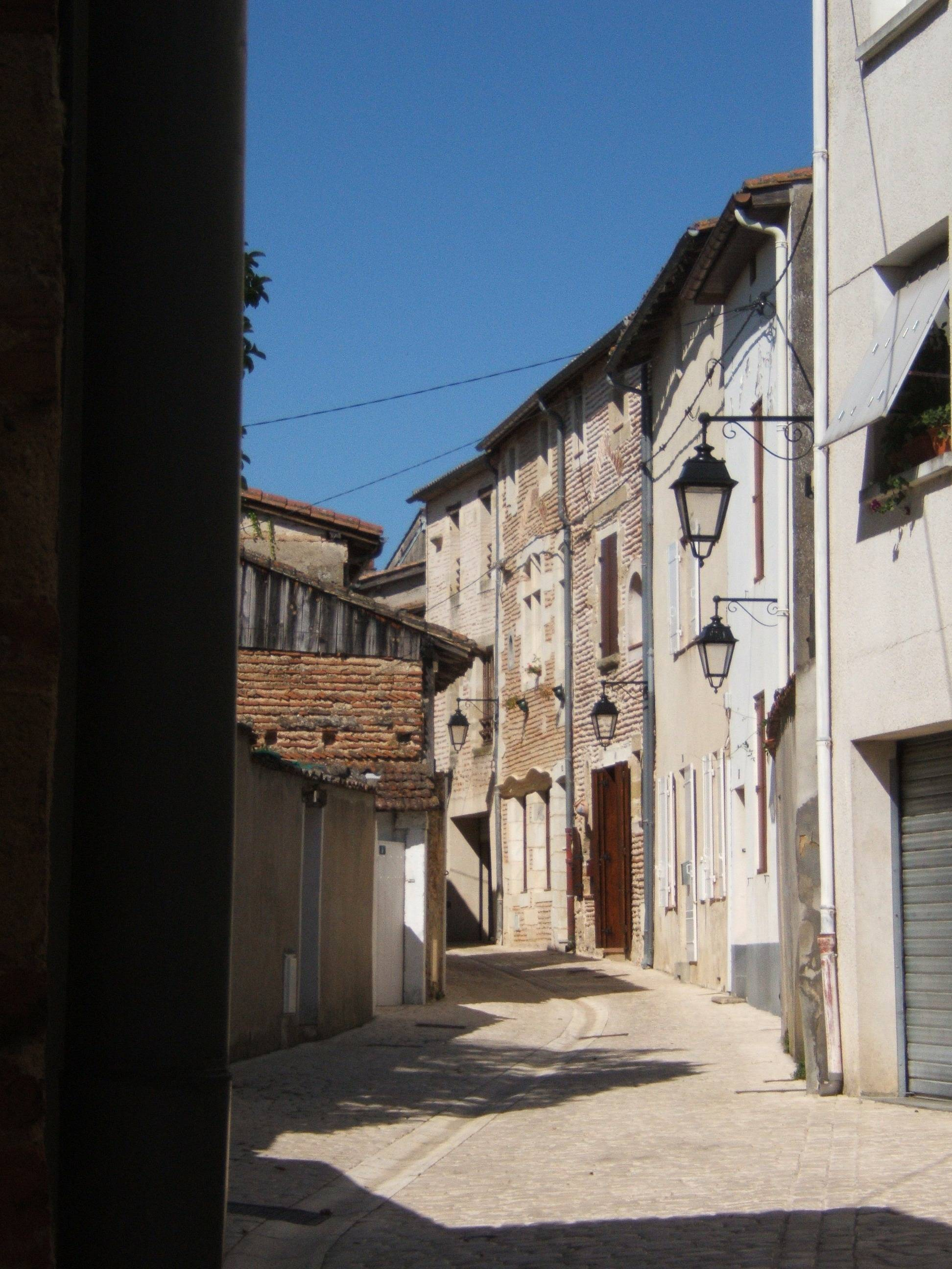 Une photographie de Marmande.